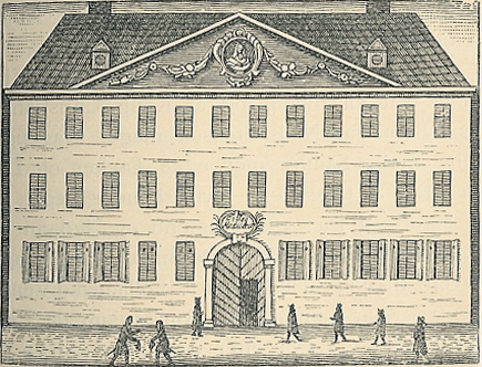 Borchs Kollegium i sin oprindelige skikkelse. 1696.